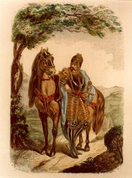 Ilustracja do "Grażyny" A. Mickiewicza